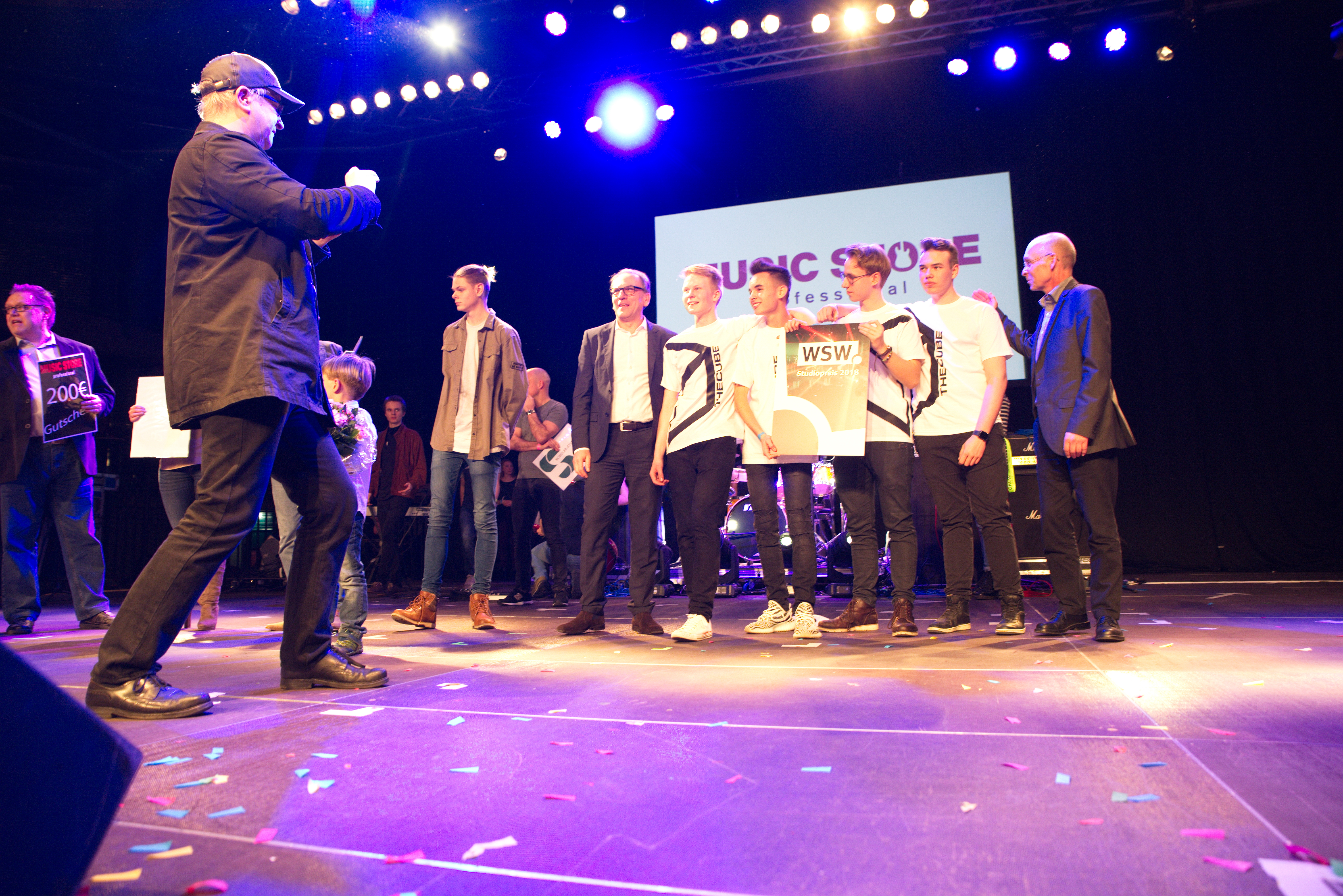 Schüler-Rockfestival 2018